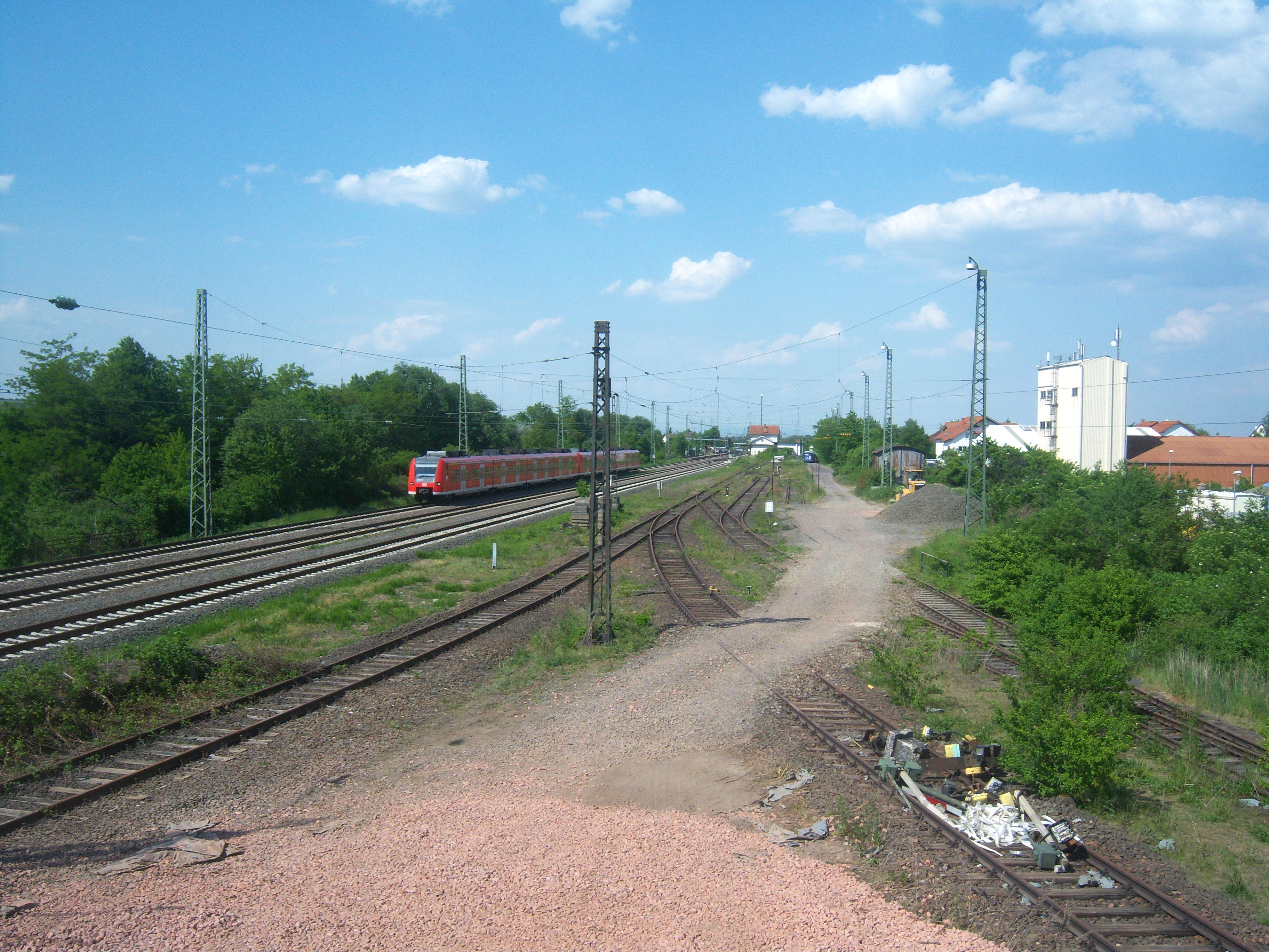 Der Guntersblumer Bahnhof: links die Bahnstrecke Mainz-Ludwigshafen, rechts die alte Altrheinbahn nach Osthofen über Eich (Rheinhessen)